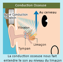 Explication de la conduction osseuse